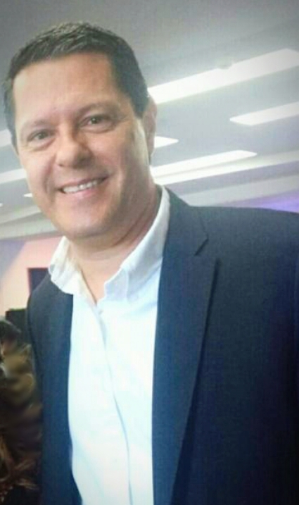 Periodista y presentador de noticias. Director (2015- ) de Noticias Caracol.